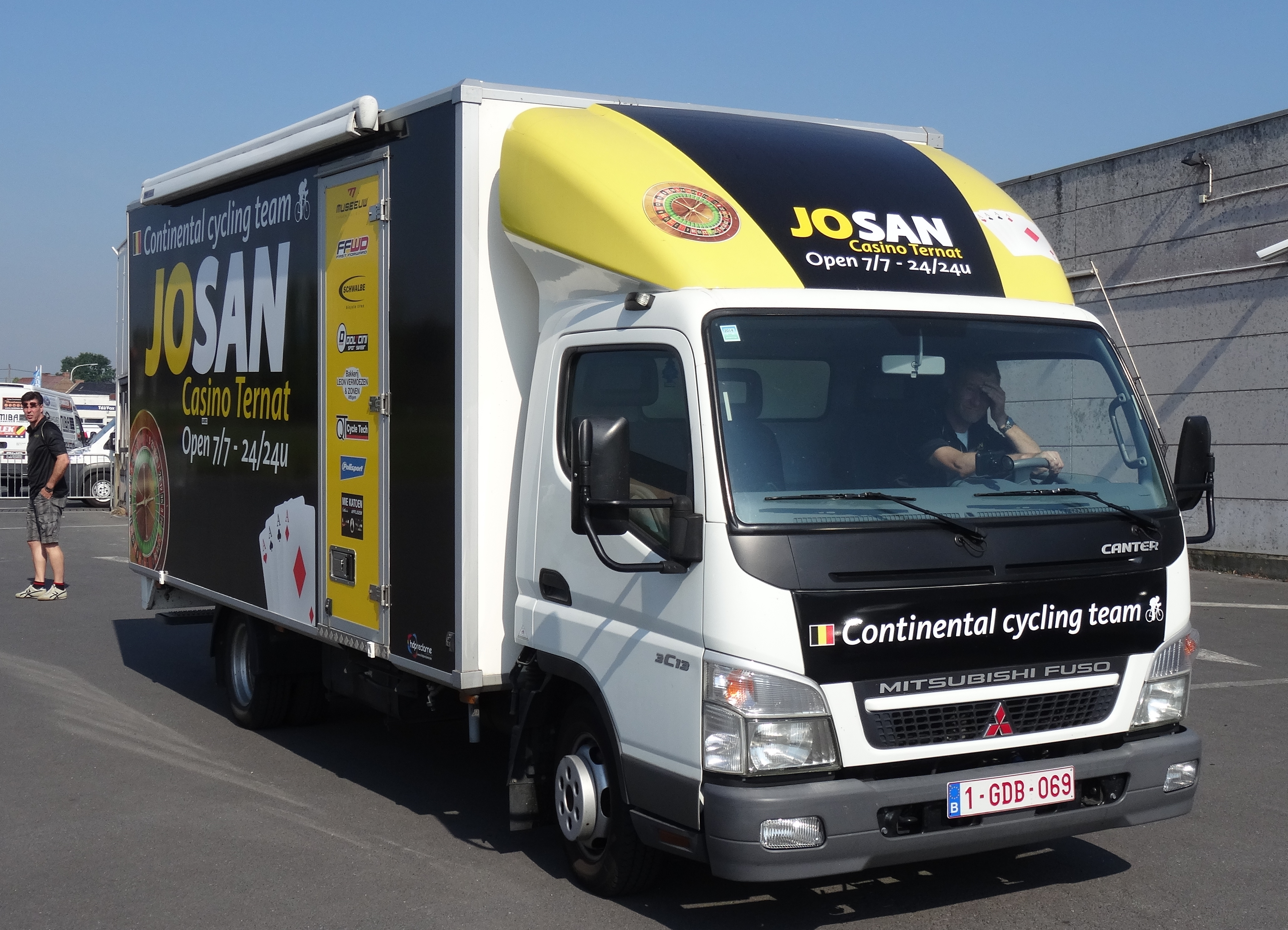 Reportage réalisé le samedi 17 mai à l'occasion du départ du Grand Prix Criquielion 2014 à Boussu, Belgique.